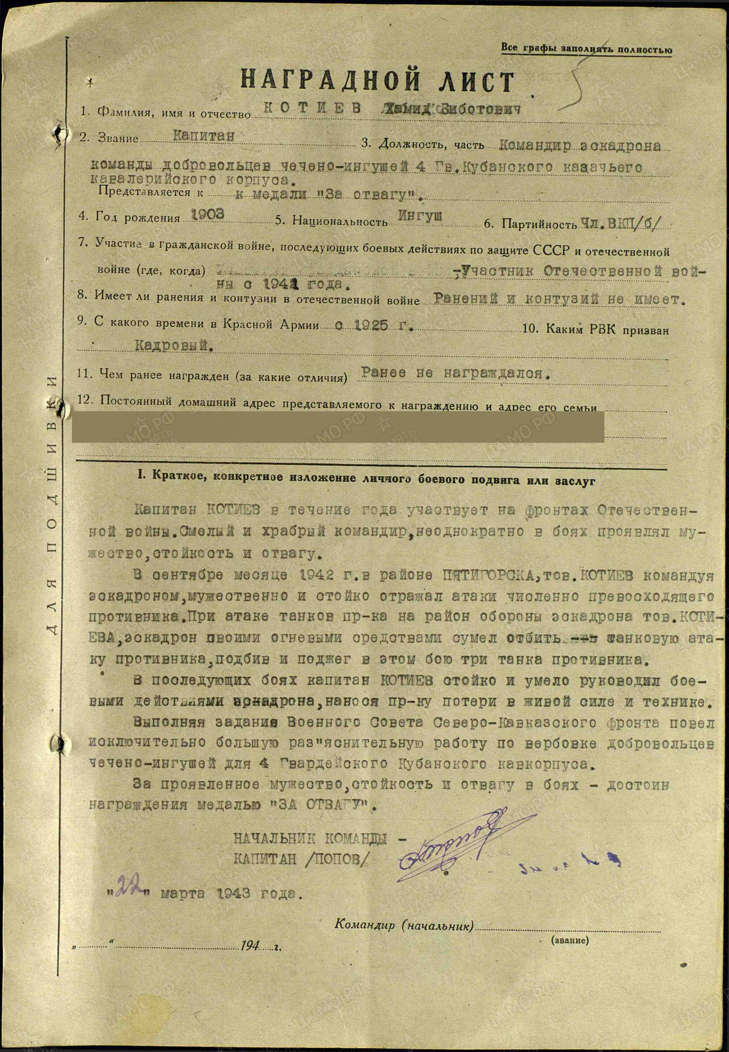 Эскадрон Котиева в 1942 при обороне Пятигорска, своими огневыми средствами сумел отбить танковую атаку противника, подбив в этом бою три танка противника